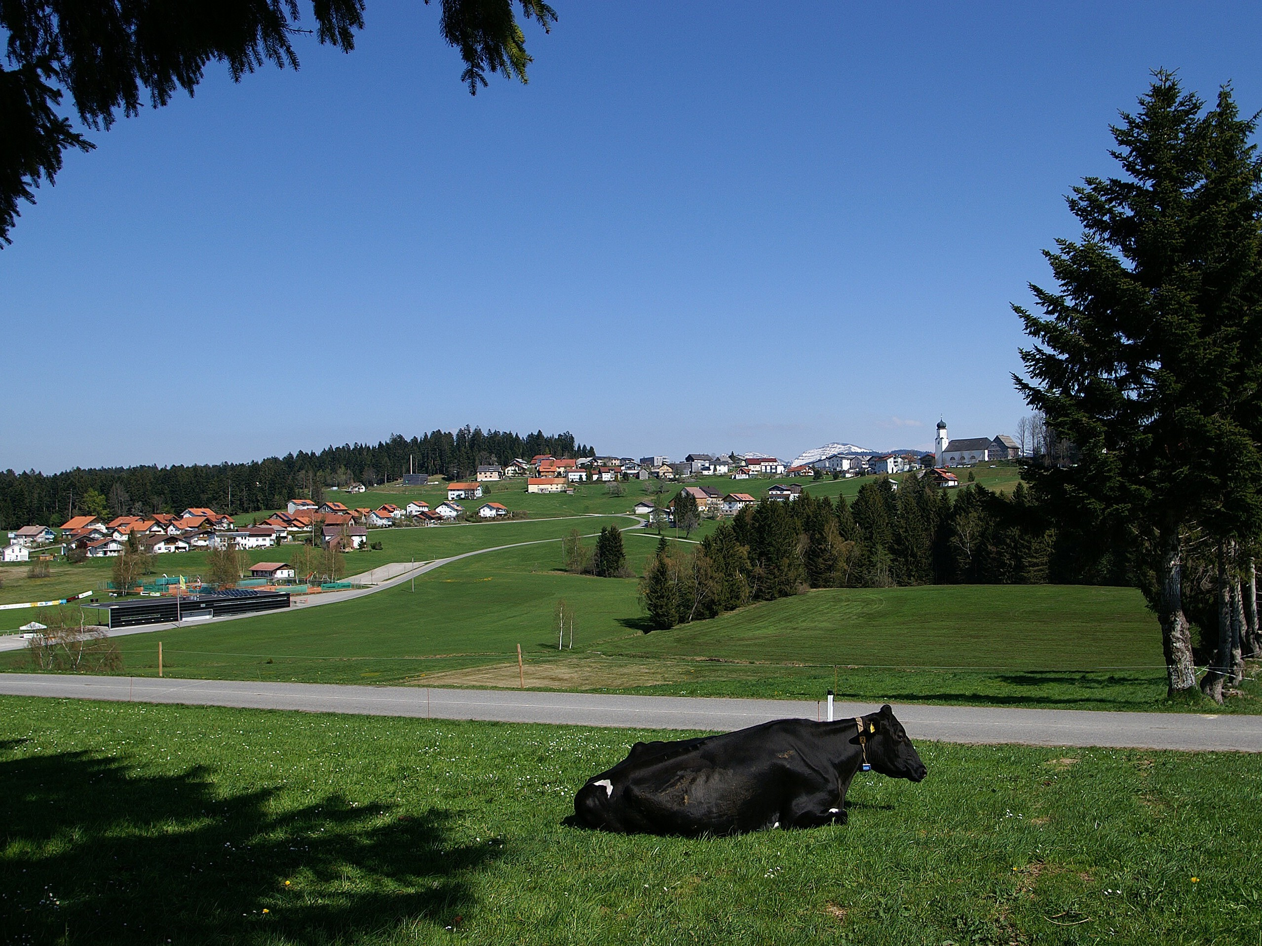 Blick von Bücher auf das Kirchdorf von Sulzberg, Vorarlberg. Im Bildvordergrund ein Holstein-Rind